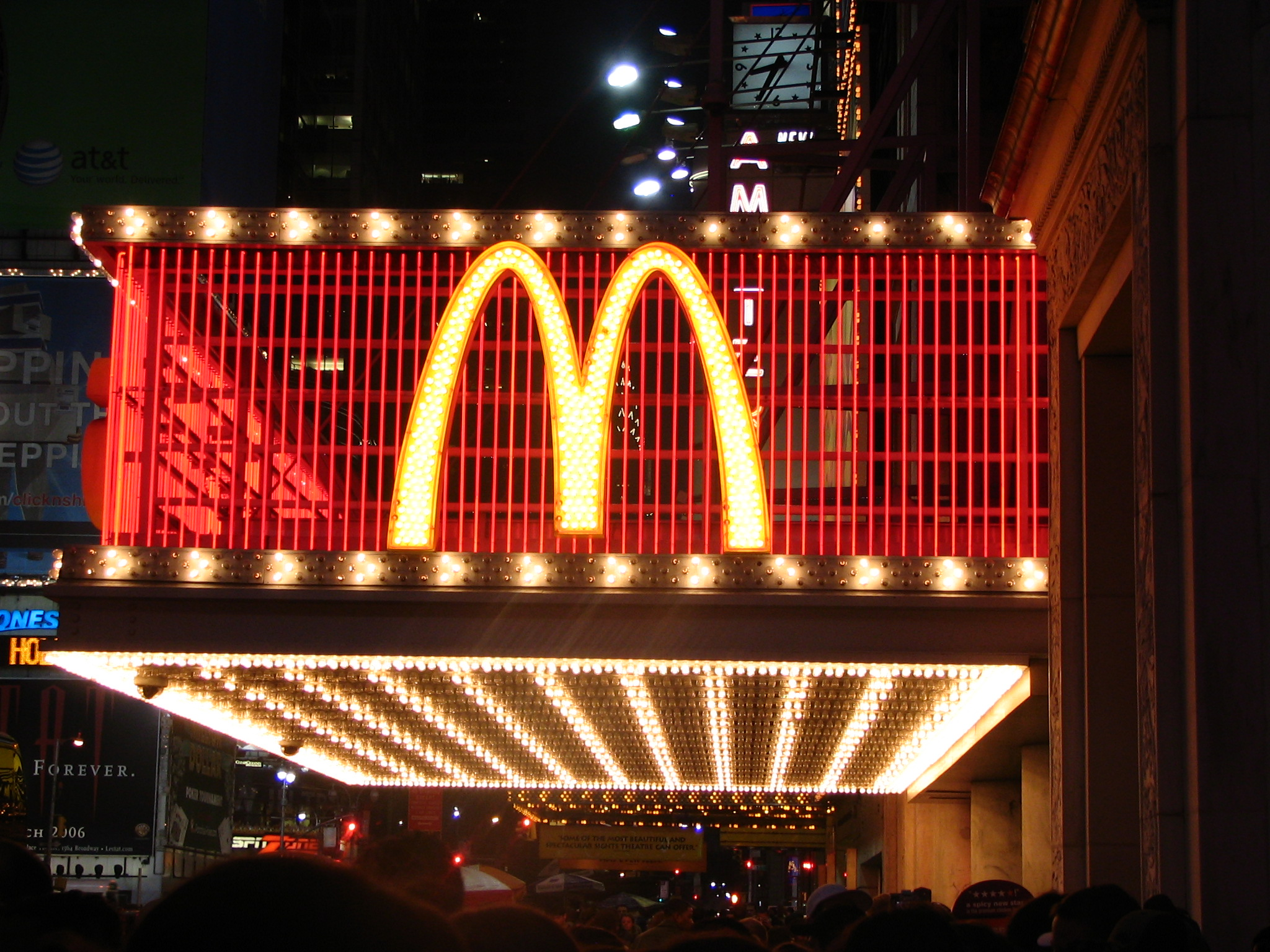 Enseigne du restaurant McDonald's sur Times Square. Photographie par Ramy Majouji.